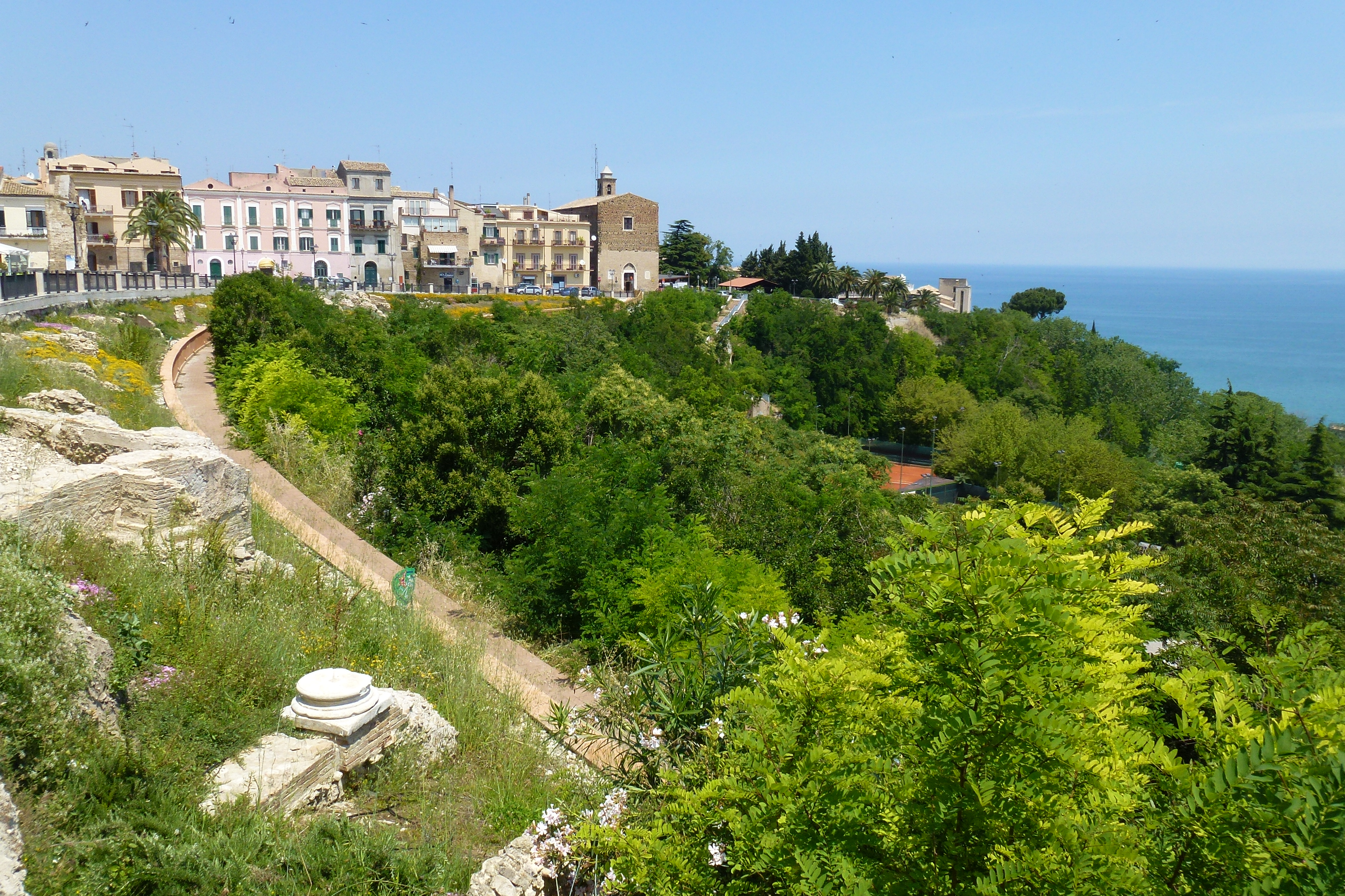 Vasto